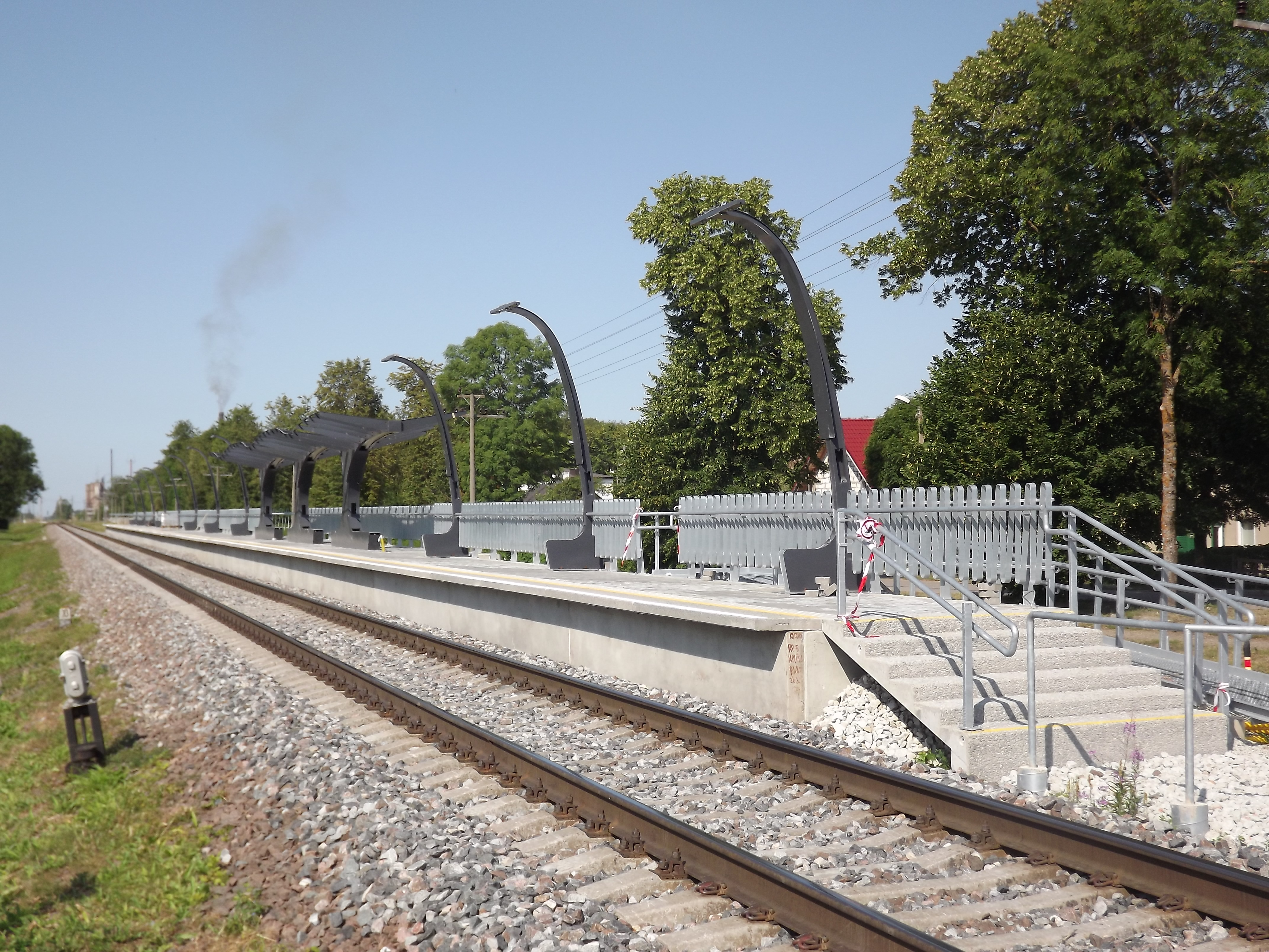 Kiviõli uus perroon.